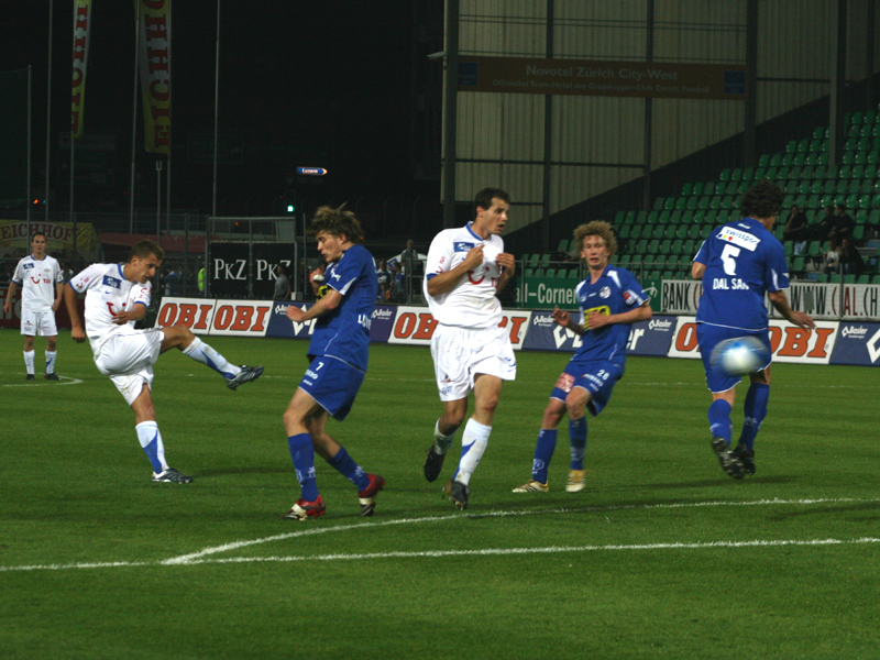 Almen Abdi, FCZ, Hardturm Stadion (Schweiz), Pokal Halbfinale, FC Zürich - FC Luzern 2:3